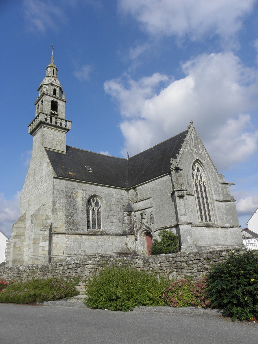 Vue méridionale de l'église Notre-dame-de-Populo en Landudal (29).